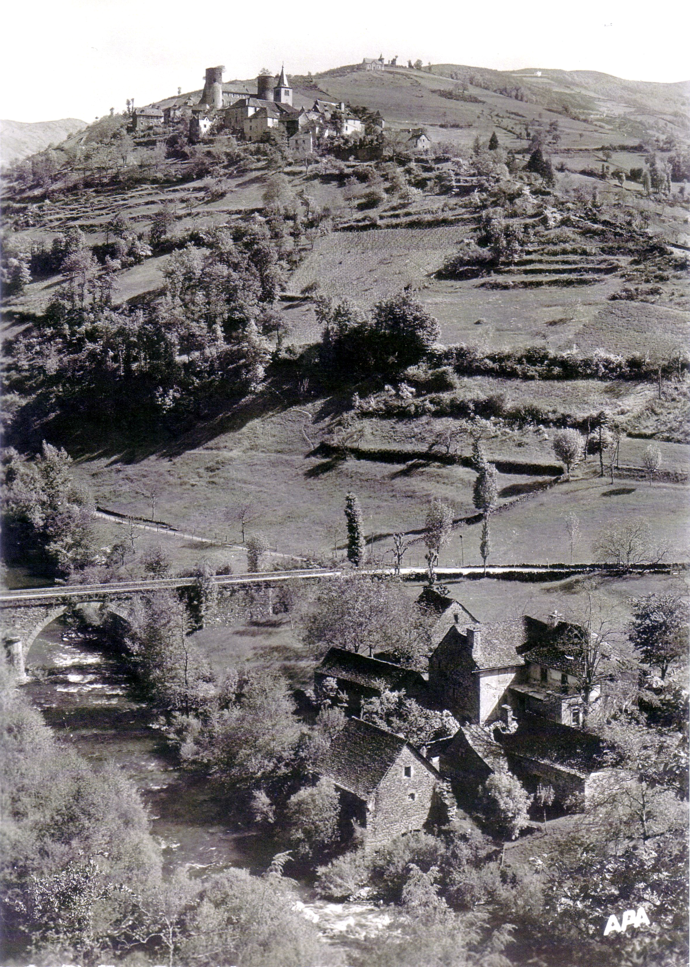 Le hameau de Chipole en 1947. Pomayrols, Aveyron, France